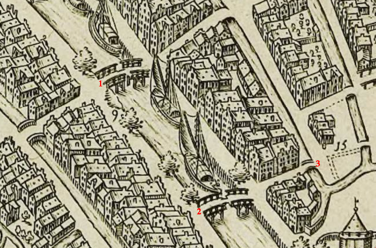 fragment van een kaart van Gouda (Braun en Hogenberg), bij 1) de Nood-Godsbrug, bij 2) de Uiterste Brug en bij 3) de Minderbroedersbrug